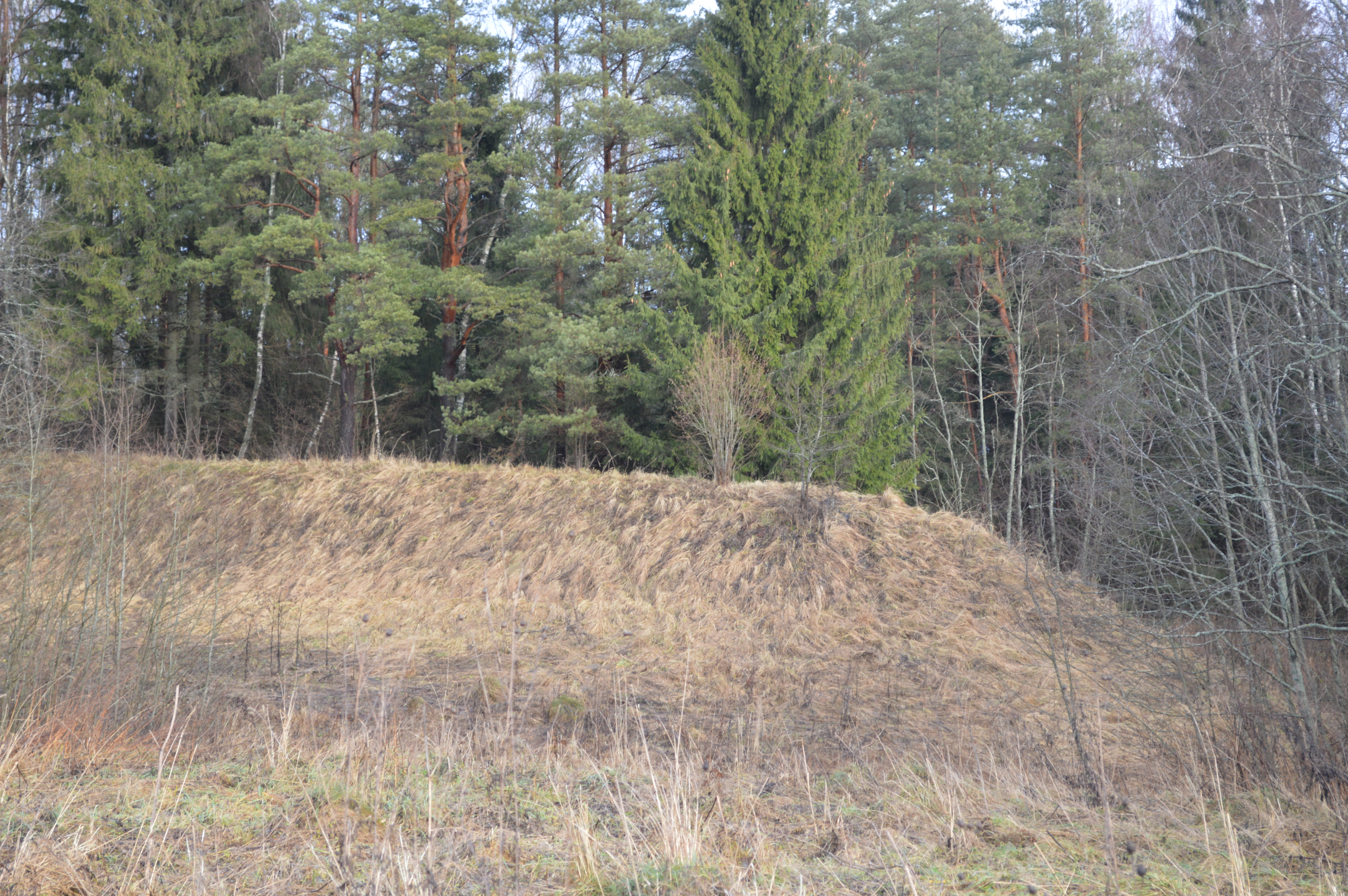 Skromaņu Greitas kalns - pilskalns